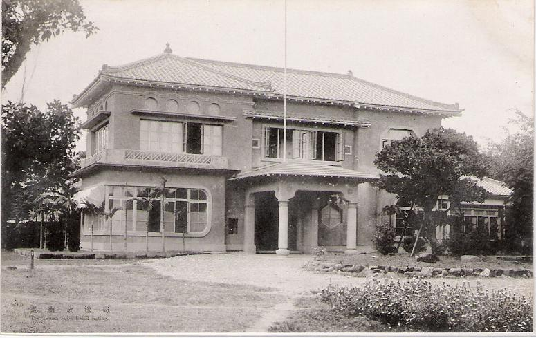 臺灣放送協會臺南放送局。